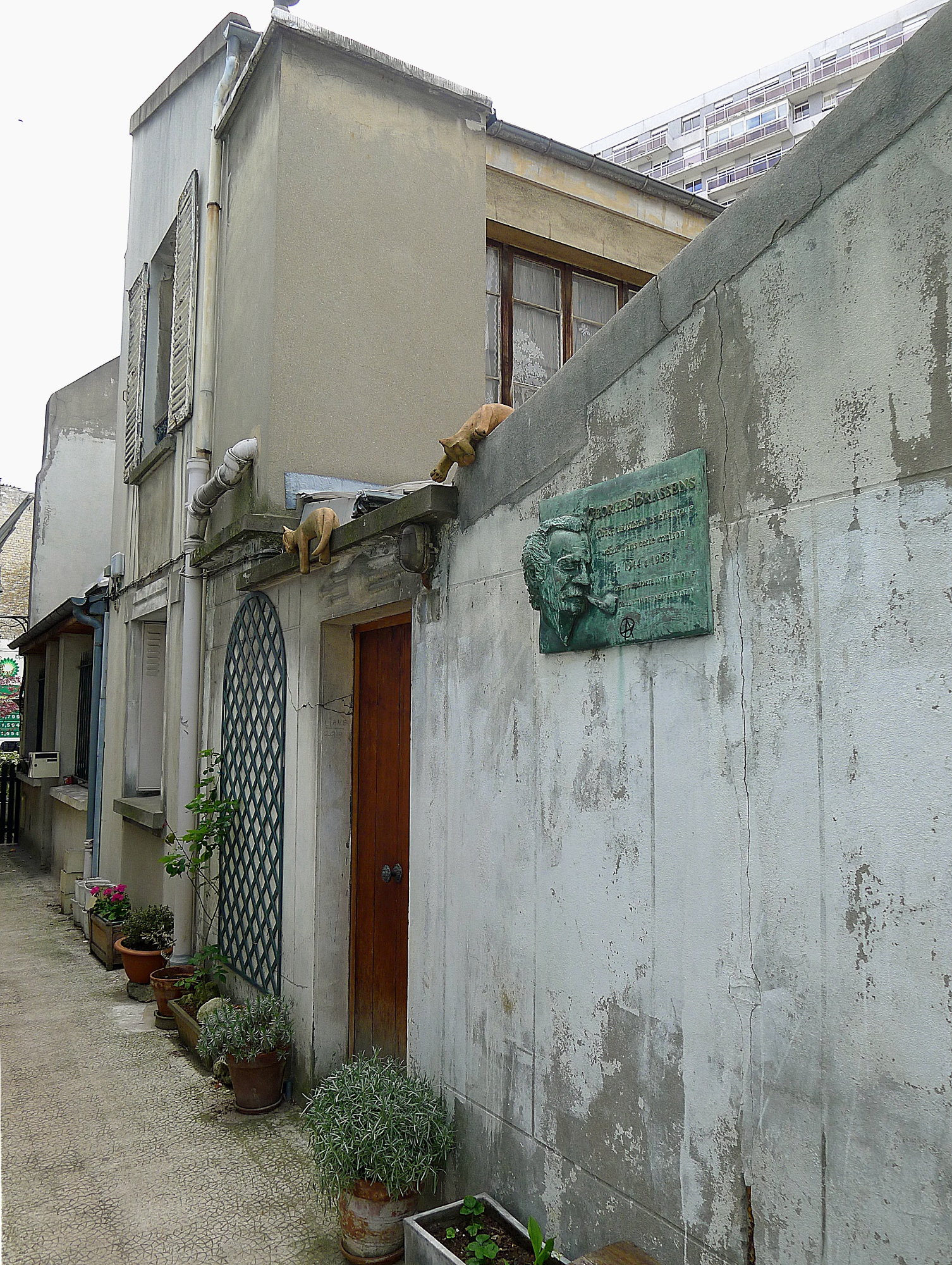 Impasse Florimont (maison où habita Georges Brassens de 1944 à 1966) - Paris XIV